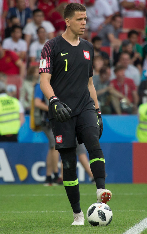 Польша неожиданно проиграла Сенегалу